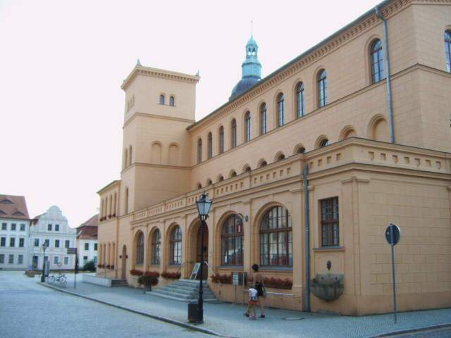 Rathaus der Stadt Luckau, Land Brandenburg, Deutschland Bild aufgenommen am 25.6.2006 von Olaf Meister